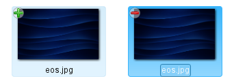 dolphin kde4 file selection